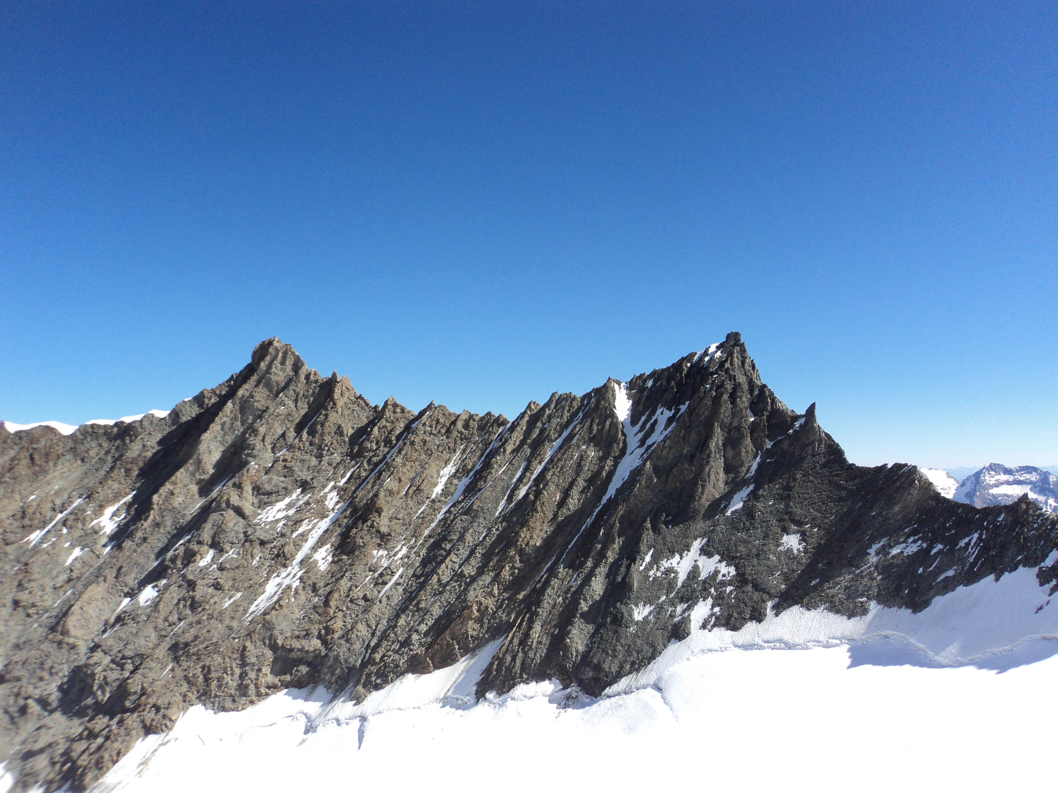 Il Nadelhorn ed il Lenzspitze visti dall'Hohberggletscher (da sud-ovest)